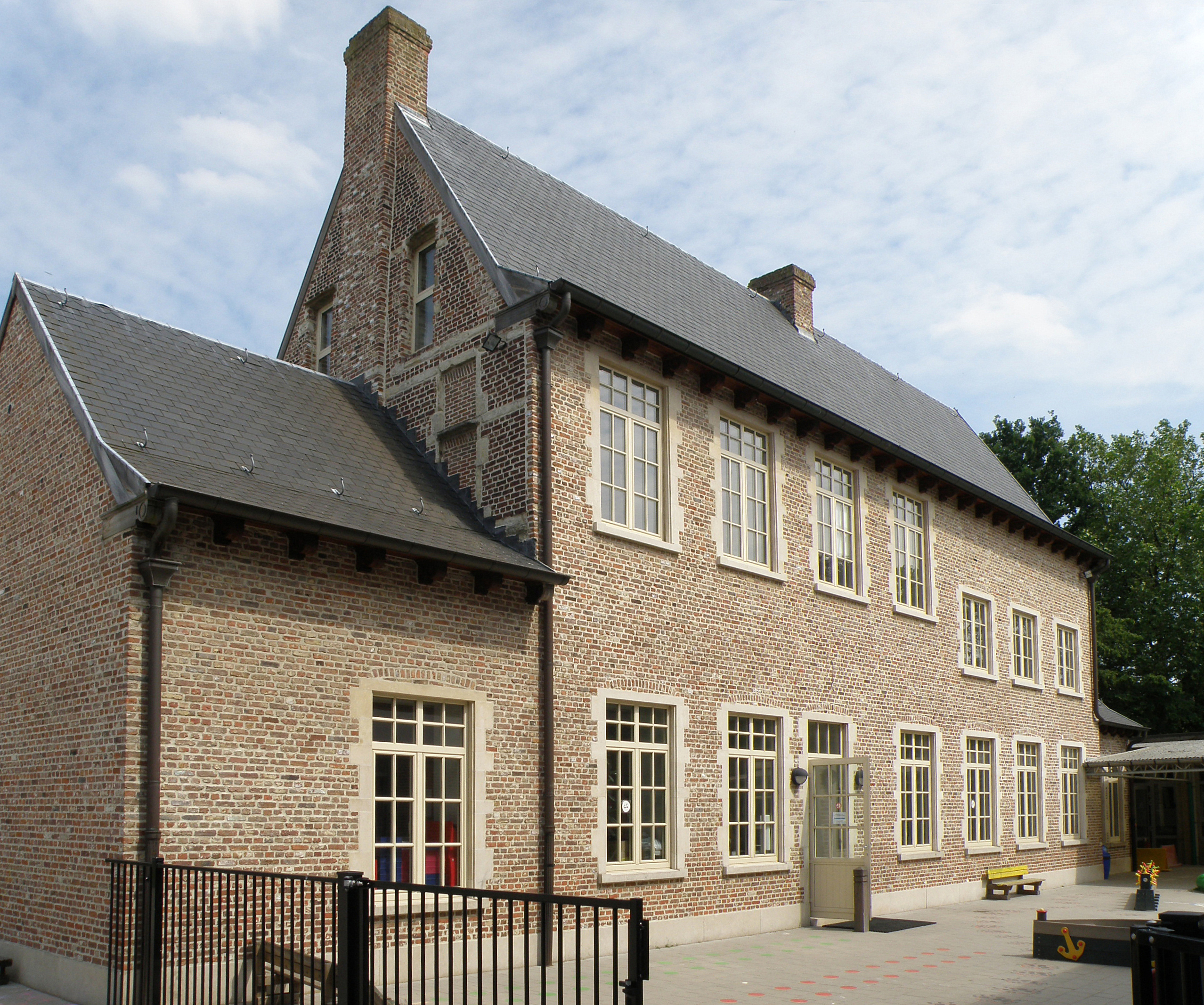 Antwerpen, district Hoboken. Spaans Huis, aan de Kioskplaats, thans kleuterafdeling Sint-Agnesinstituut. Eerste kwart 17de eeuw. Westgevel.